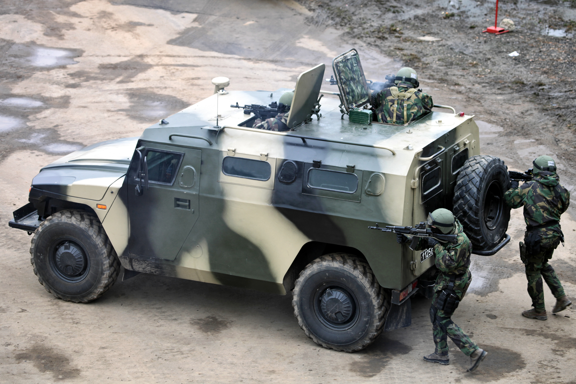 Военнослужащие 604-го центра специального назначения внутренних войск МВД России ЦСН Витязь (Operators from 604th Special Purpose Center Vityaz of Internal troops)